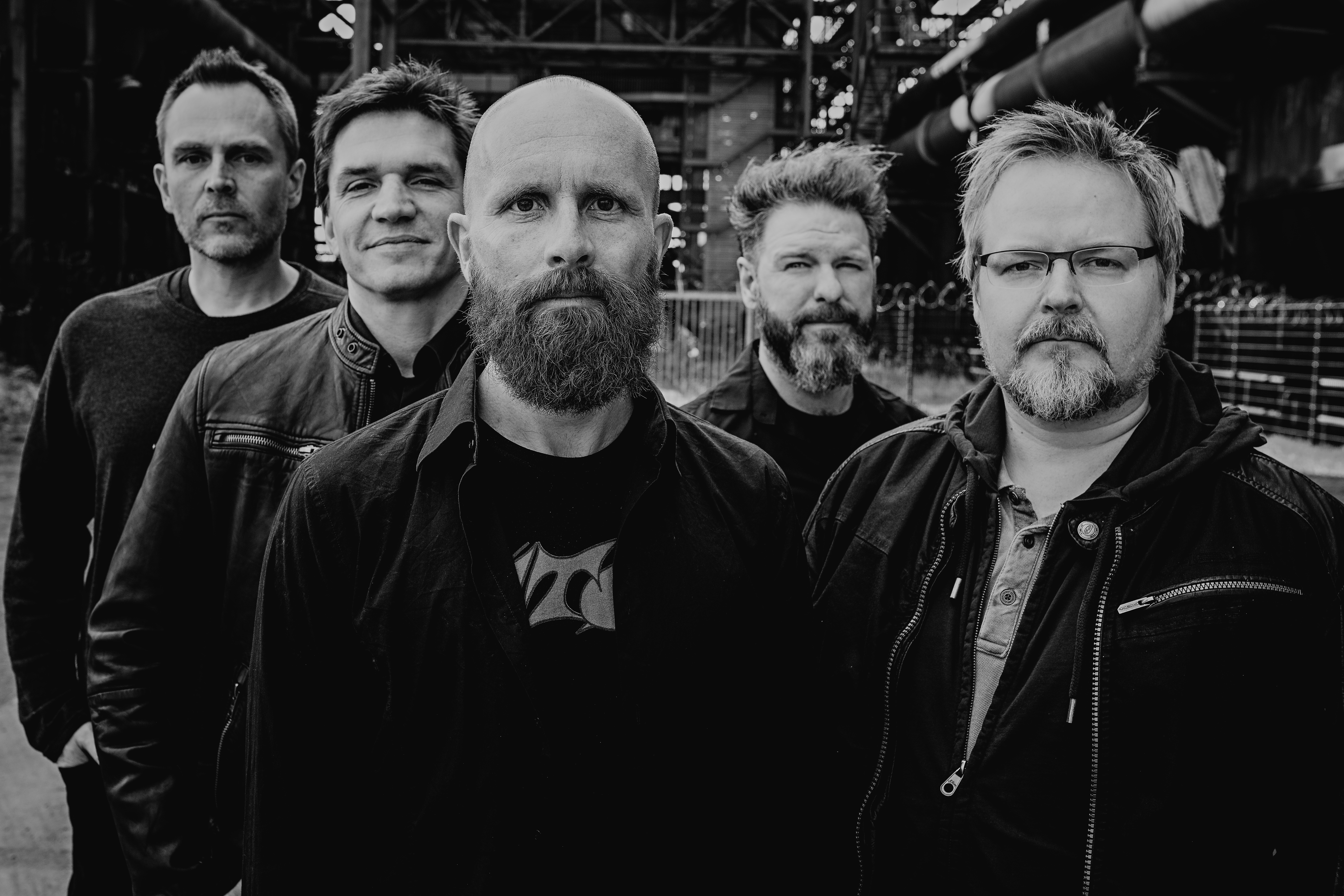 Bandfoto der Dortmunder Alternativerockband Porter